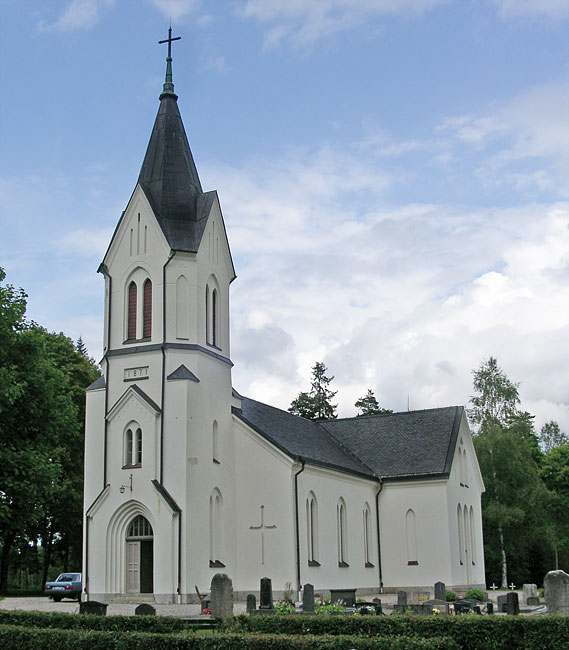 Viker church in Västmanland, Sweden 2004-07-24.